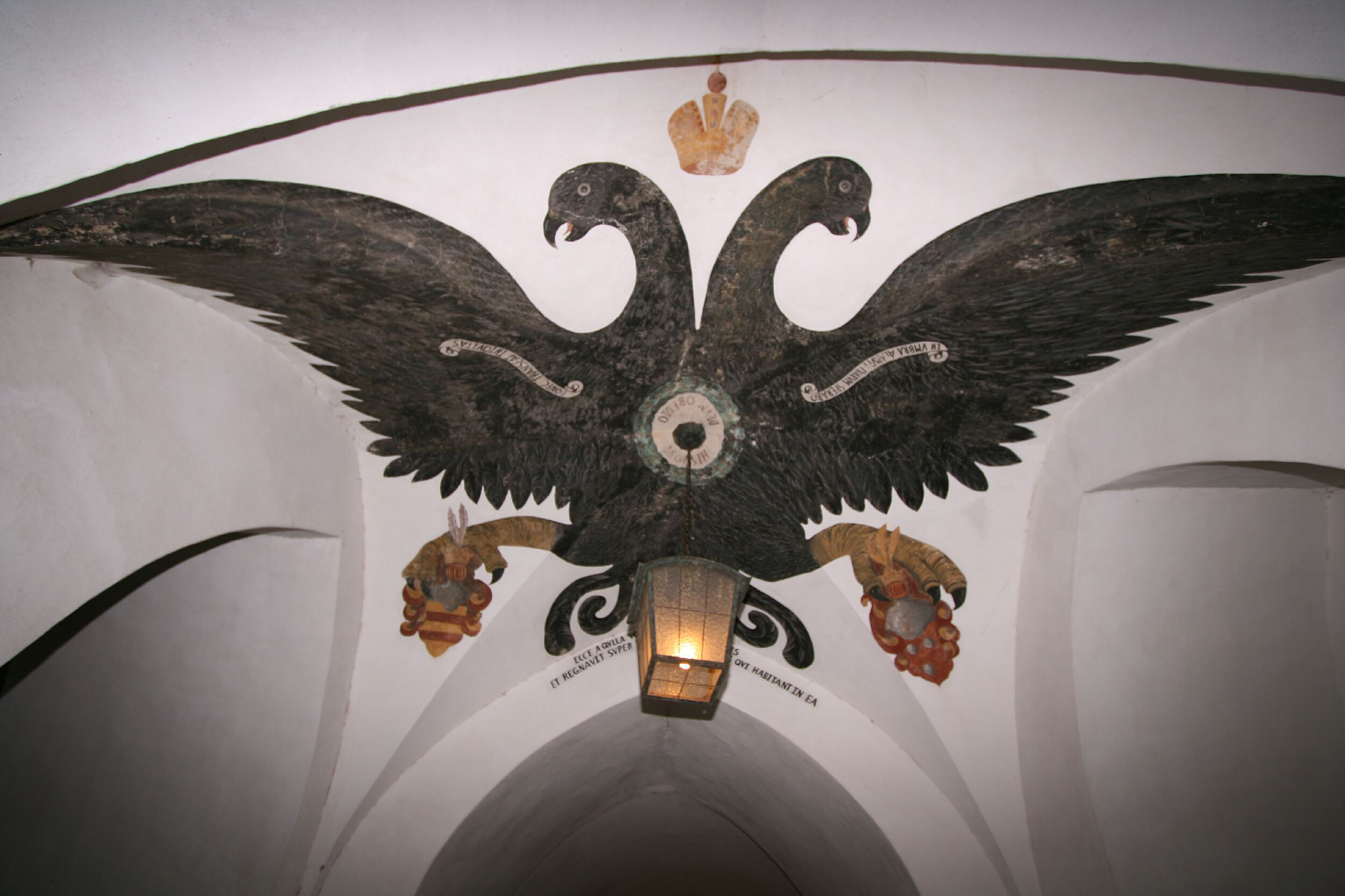 Adler mit Wappen Fürstenberg und Spiegel im Turmgewölbe der Burg Schnellenberg